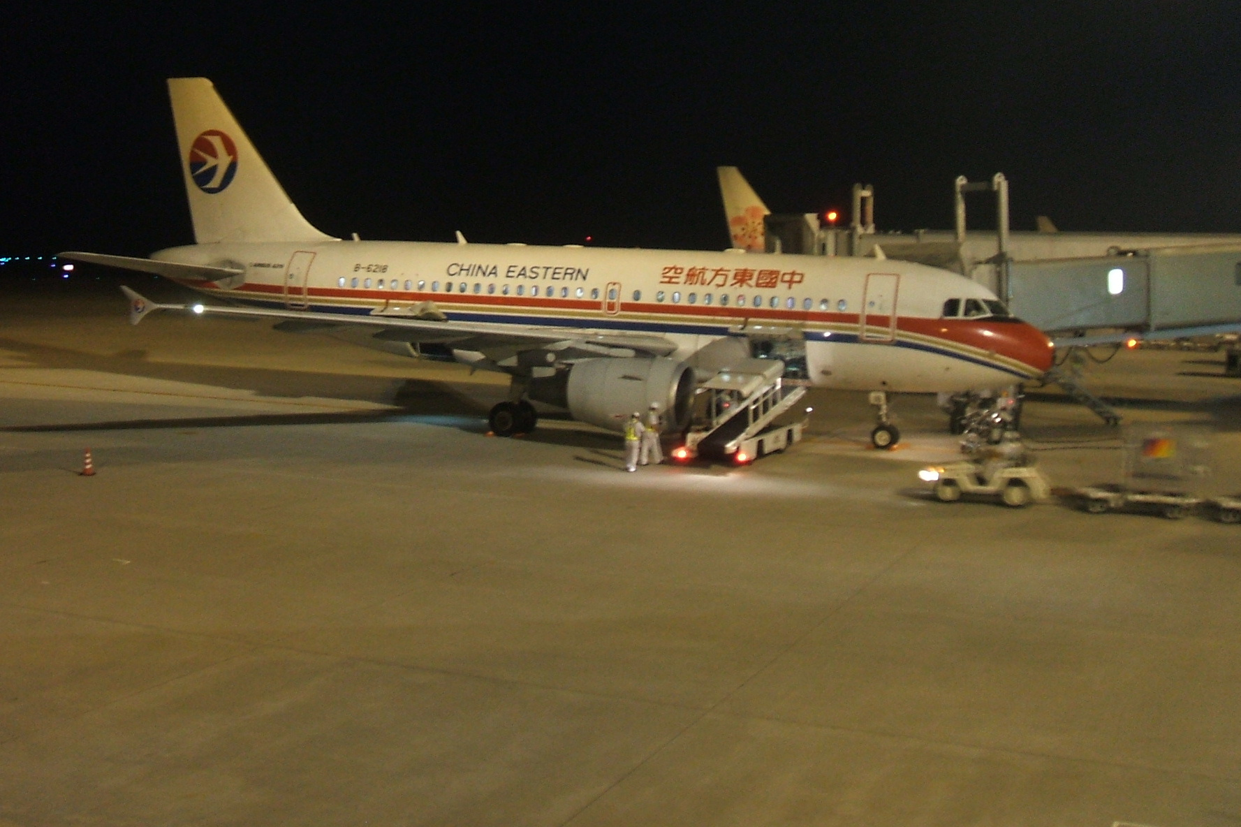 広島空港の夜間の駐機場（国際線）。手前に見えるのが中国東方航空機、尾翼のみ見えるのがチャイナエアライン機